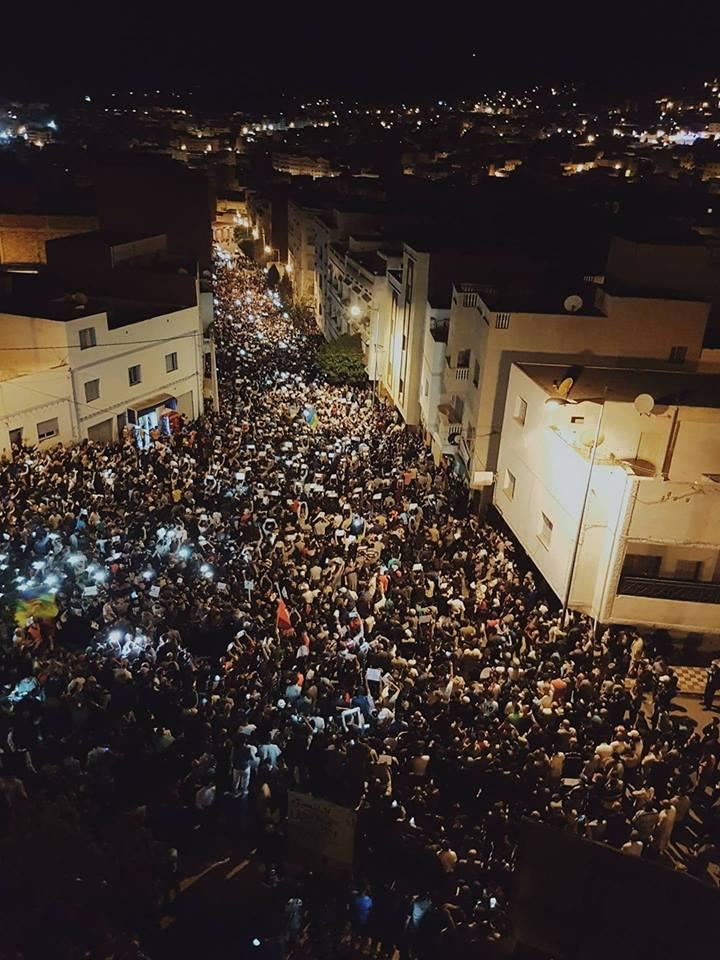 الدارجة: مظاهرة كبيرة د الحراك فالليل فالحسيمة